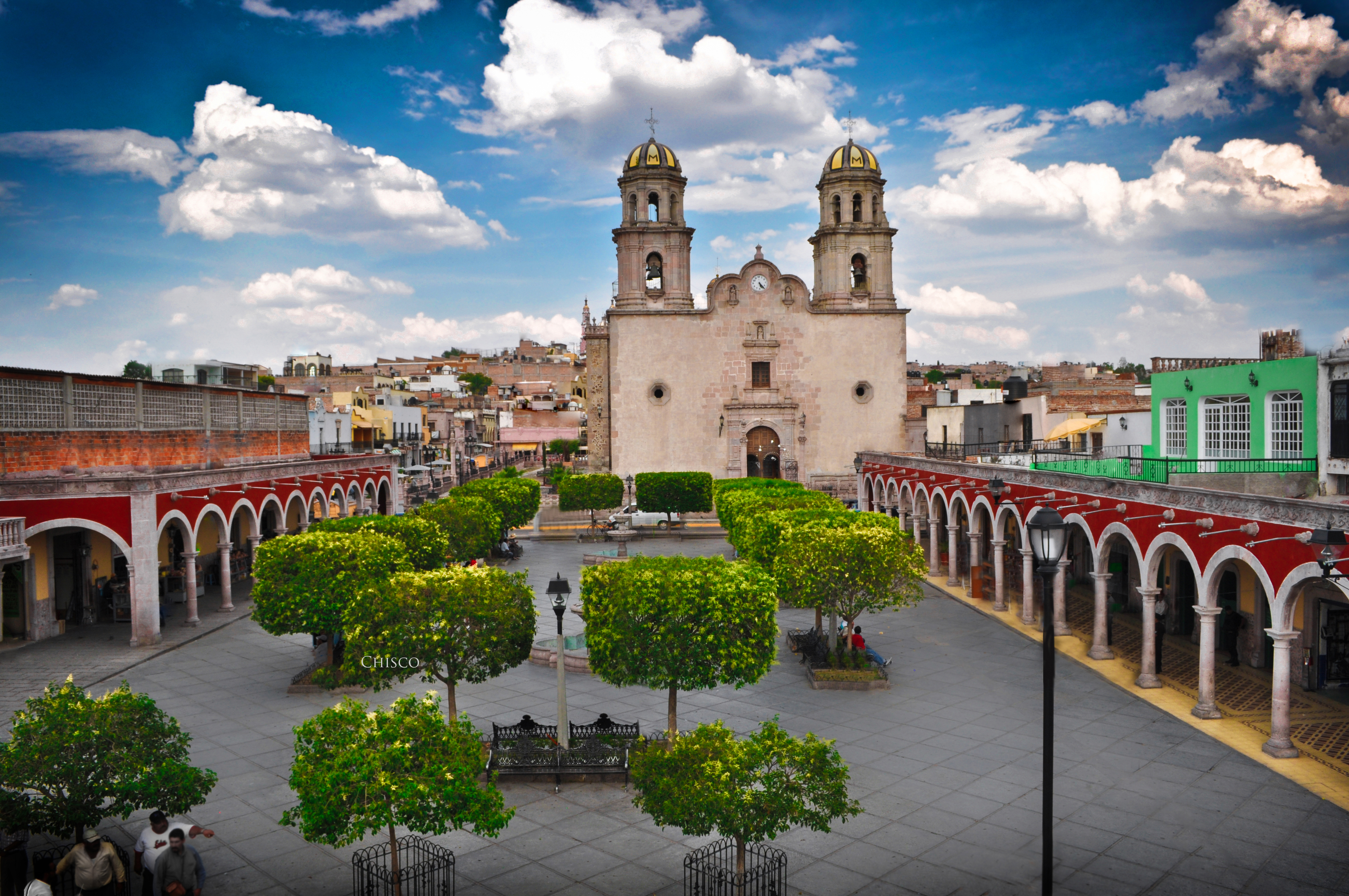 Plaza Alfredo R Plasencia en Jalostotitlán Jalisco